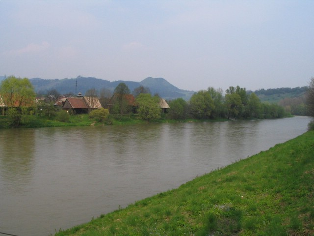 Orava River at Dolny Kubin